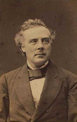 Christen Christian Frederik Schiørring (1837-1893), Danish violinist